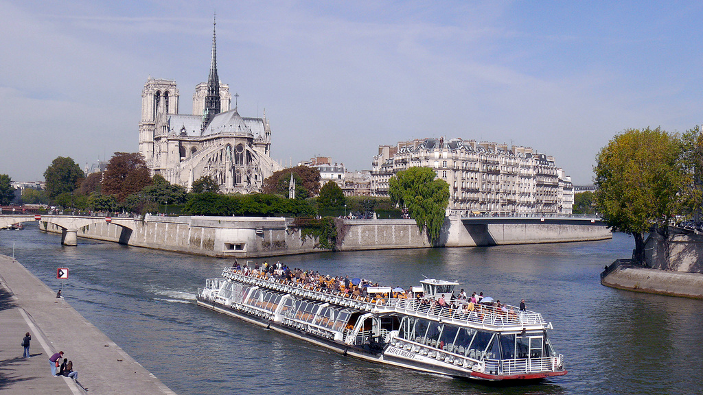 L'Île de la Cité avel la cathédrale Notre-Dame, depuis le pont de la Tournelle